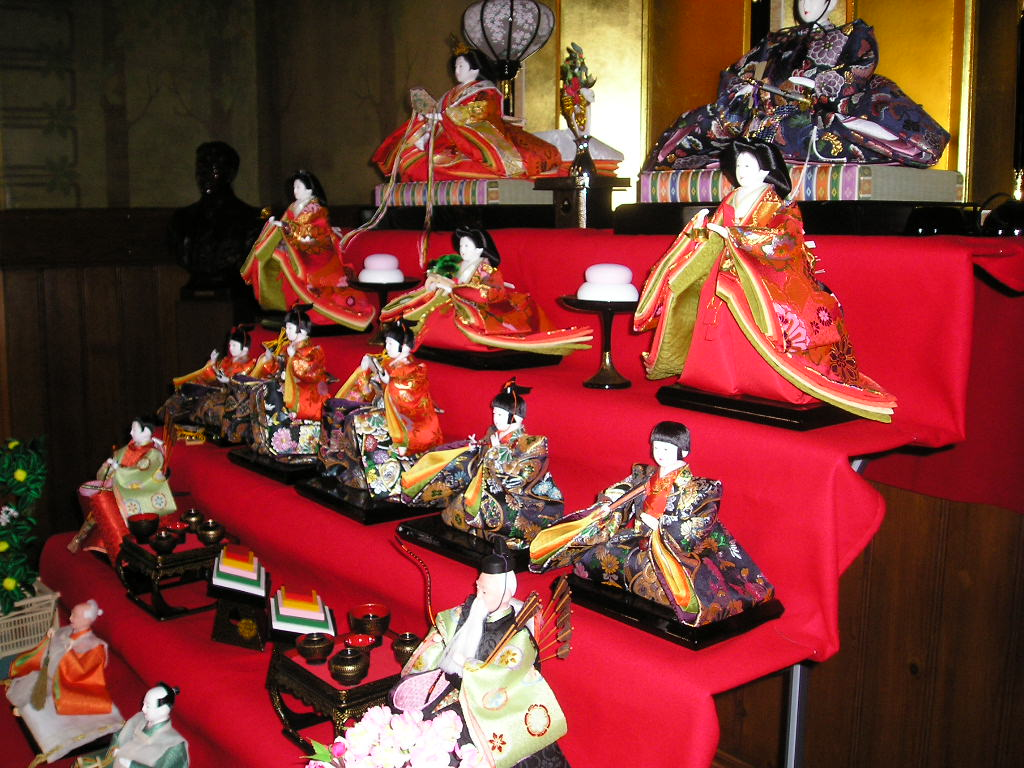 Ohina Matsuri, visión de conjnuto